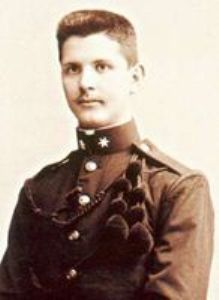 Zemplén Győző magyar fizikus, egyetemi tanár, a Magyar Tudományos Akadémia tagja.